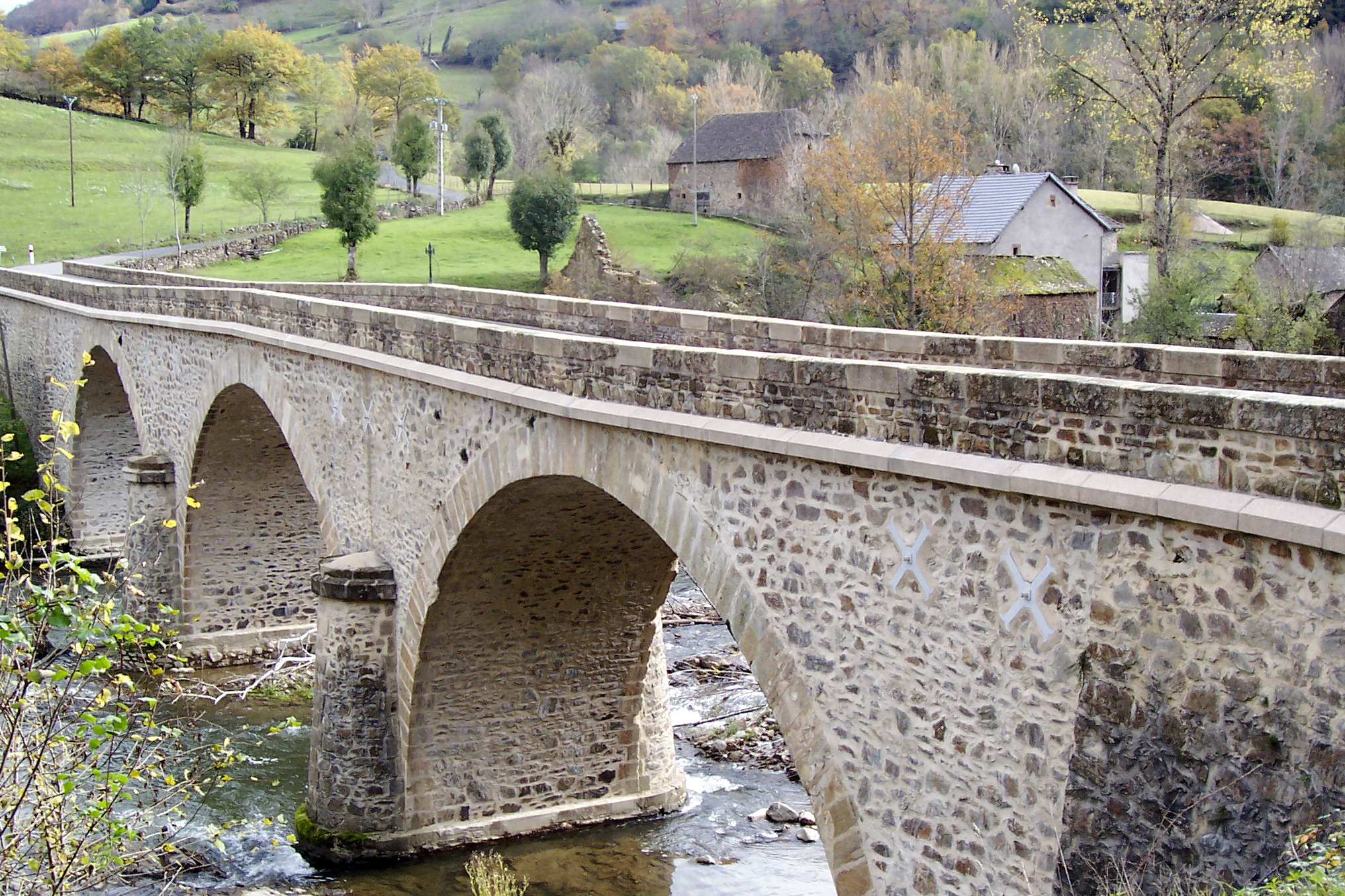 Le pont de Chipole. Pomayrols, Aveyron, France